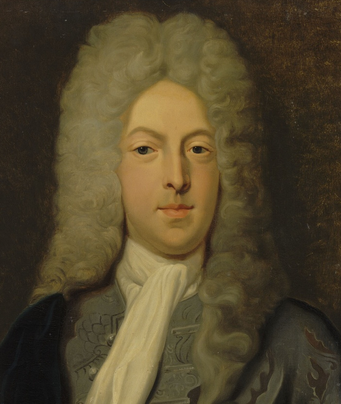 Portrait de John Law (1671-1729), Contrôleur Général des Finances, par Casimir Balthazar (1811-1875). Cliché Ronan Guilloux, 18/03/2006, Musée de la Compagnie des Indes, Ville de Lorient (France)